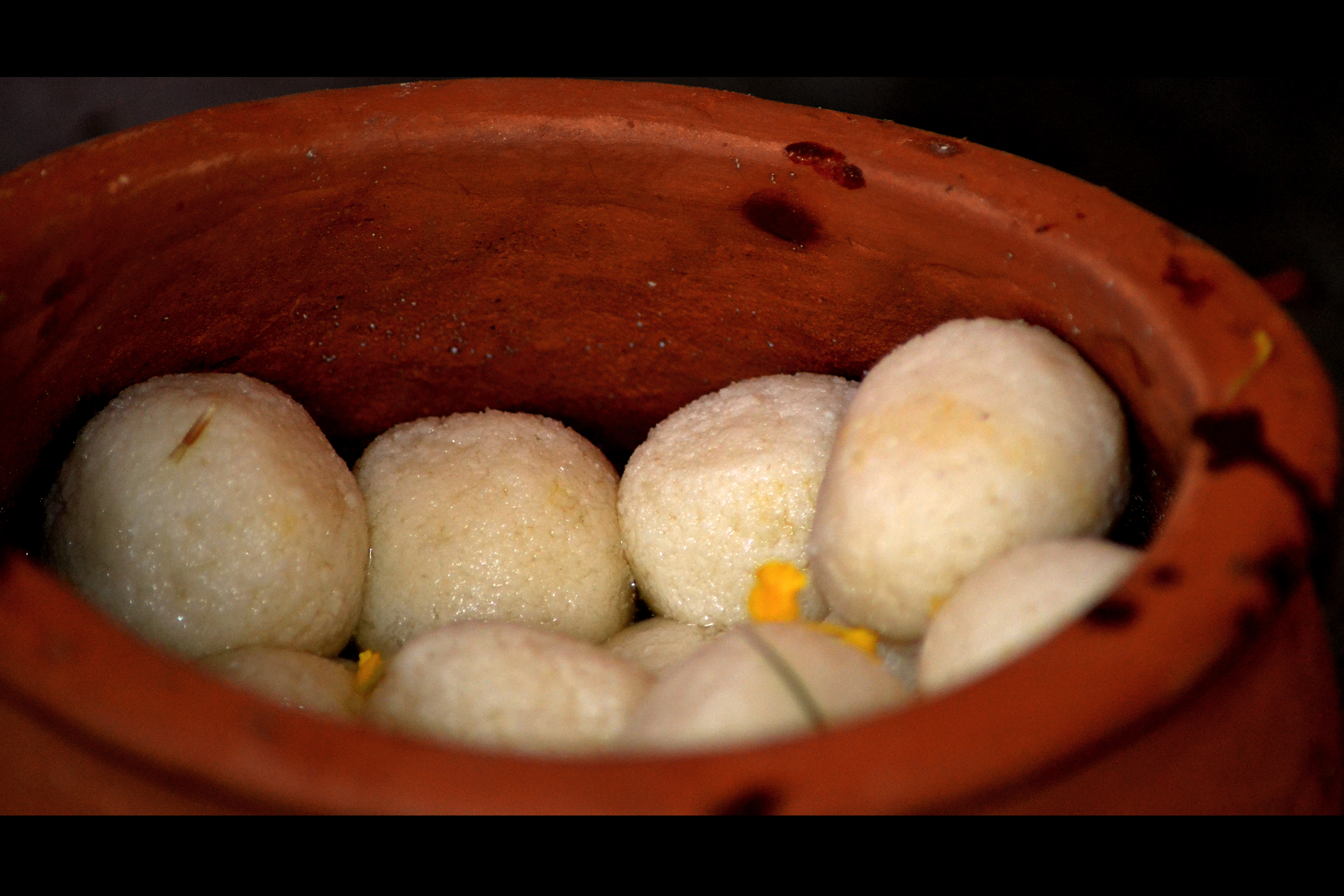 Rasgolla, Rosgolla, Rosogolla, Rusgulla, many spellings, many recipes